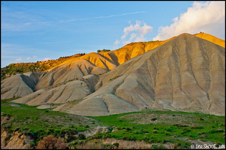 Calanchi del torrente Cannizzola - Badlands at Cannizzola's river